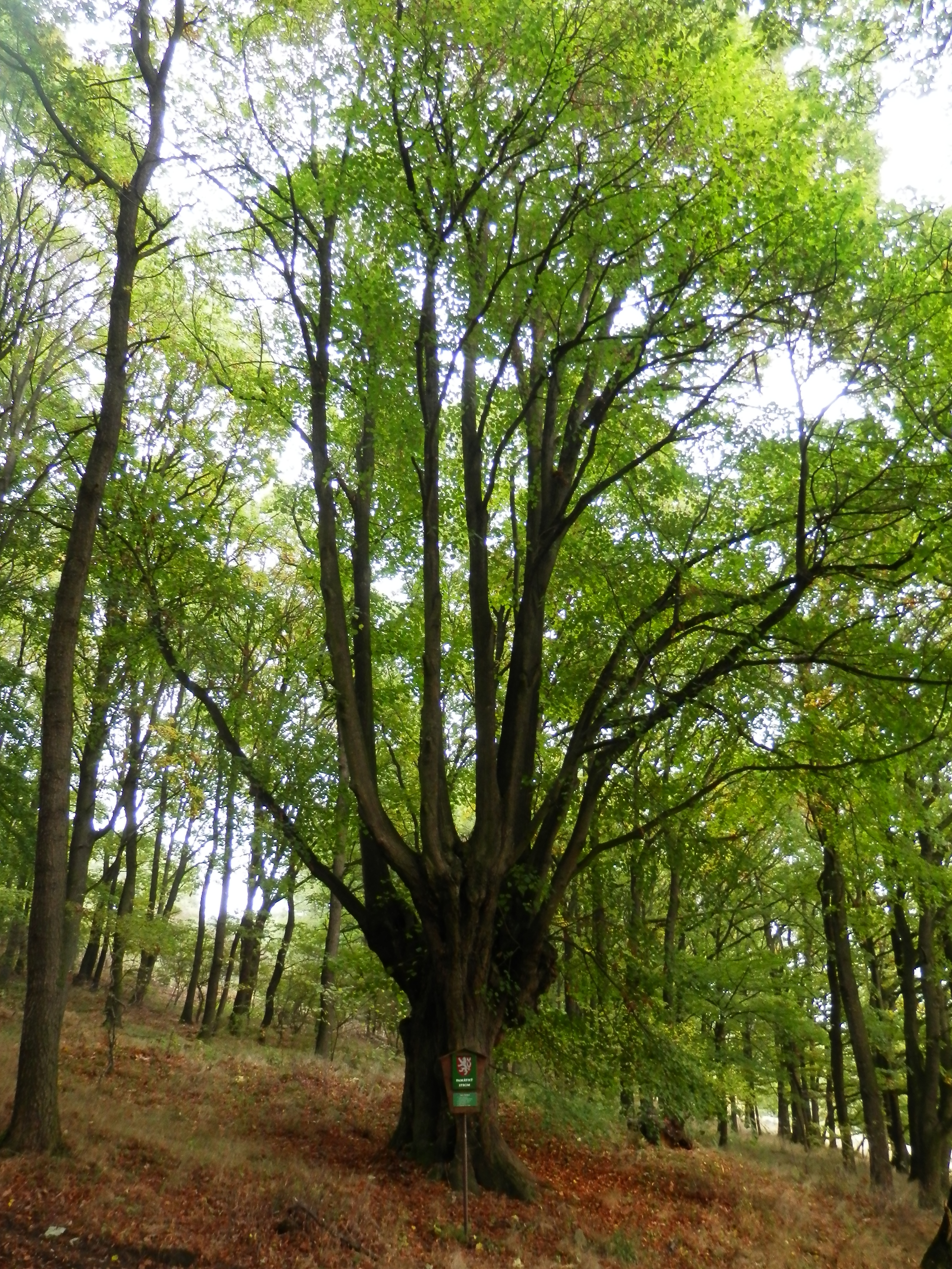 Lípa velkolistá, obvod kmene 560cm, výška stromu 25 metrů, stáří 300 let